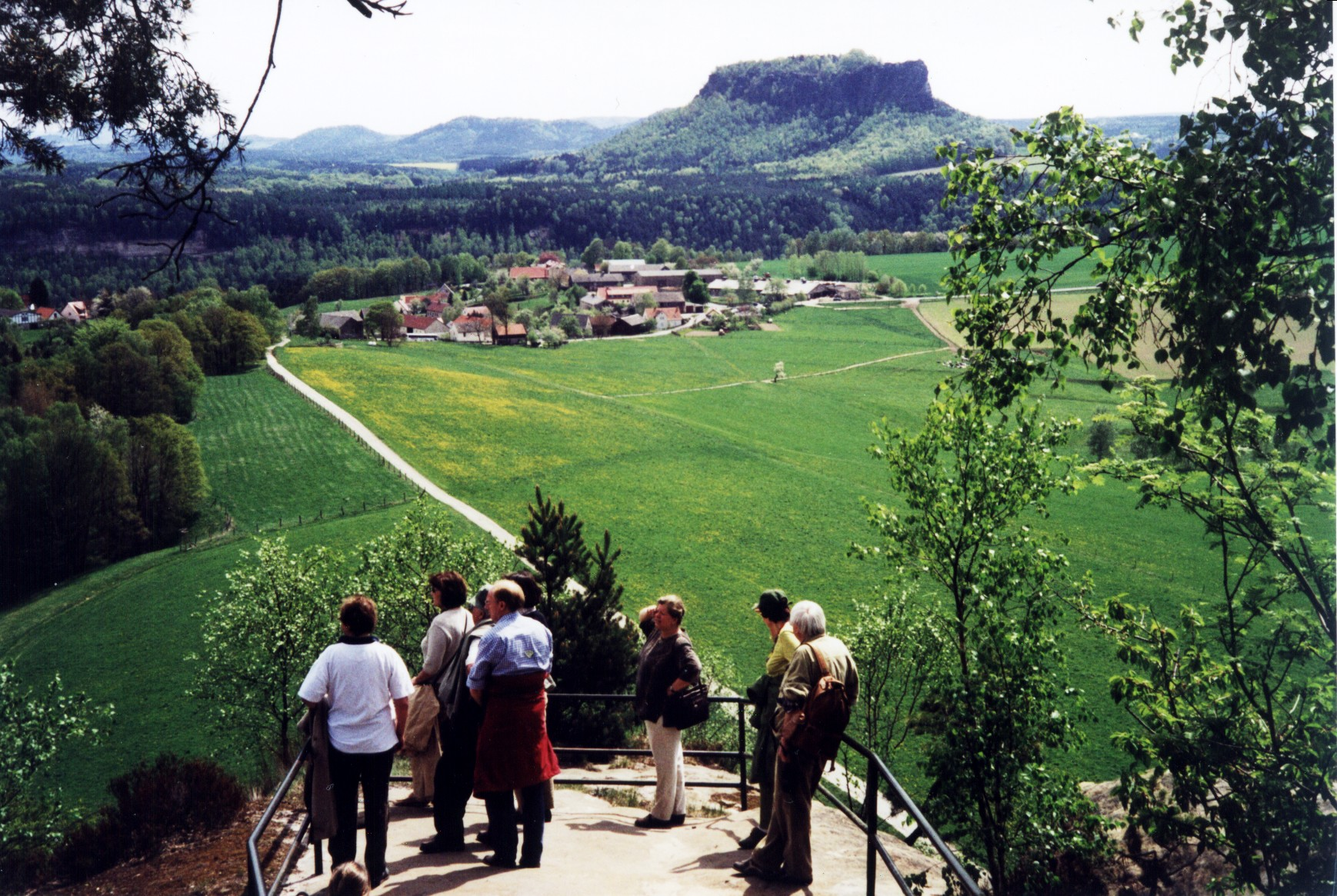 Blick vom Rauenstein in Richtung Lilienstein